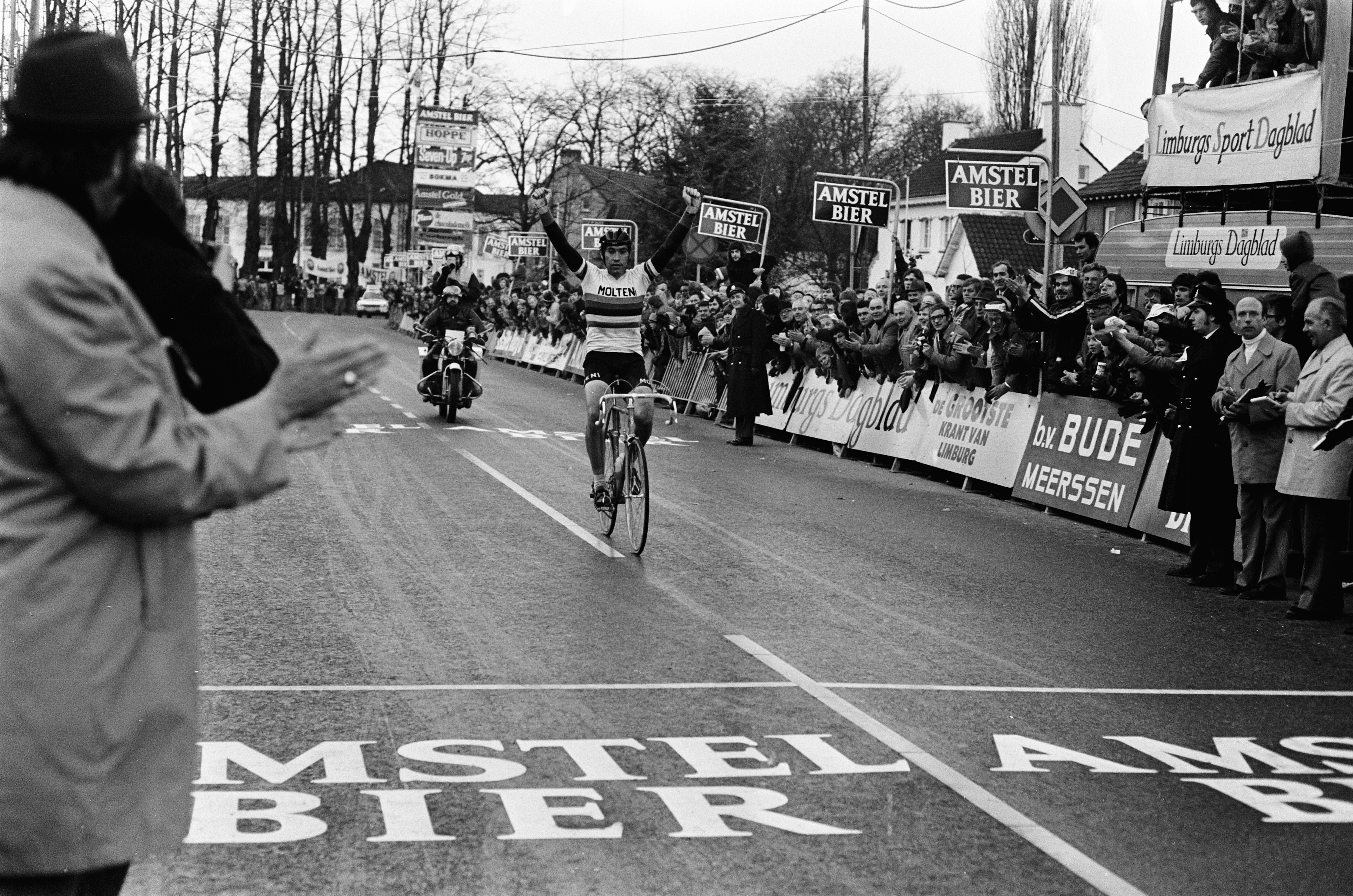 Amstel Gold Race (wielrennen); winnaar Eddy Merckx gaat juichend over de eindstreep.